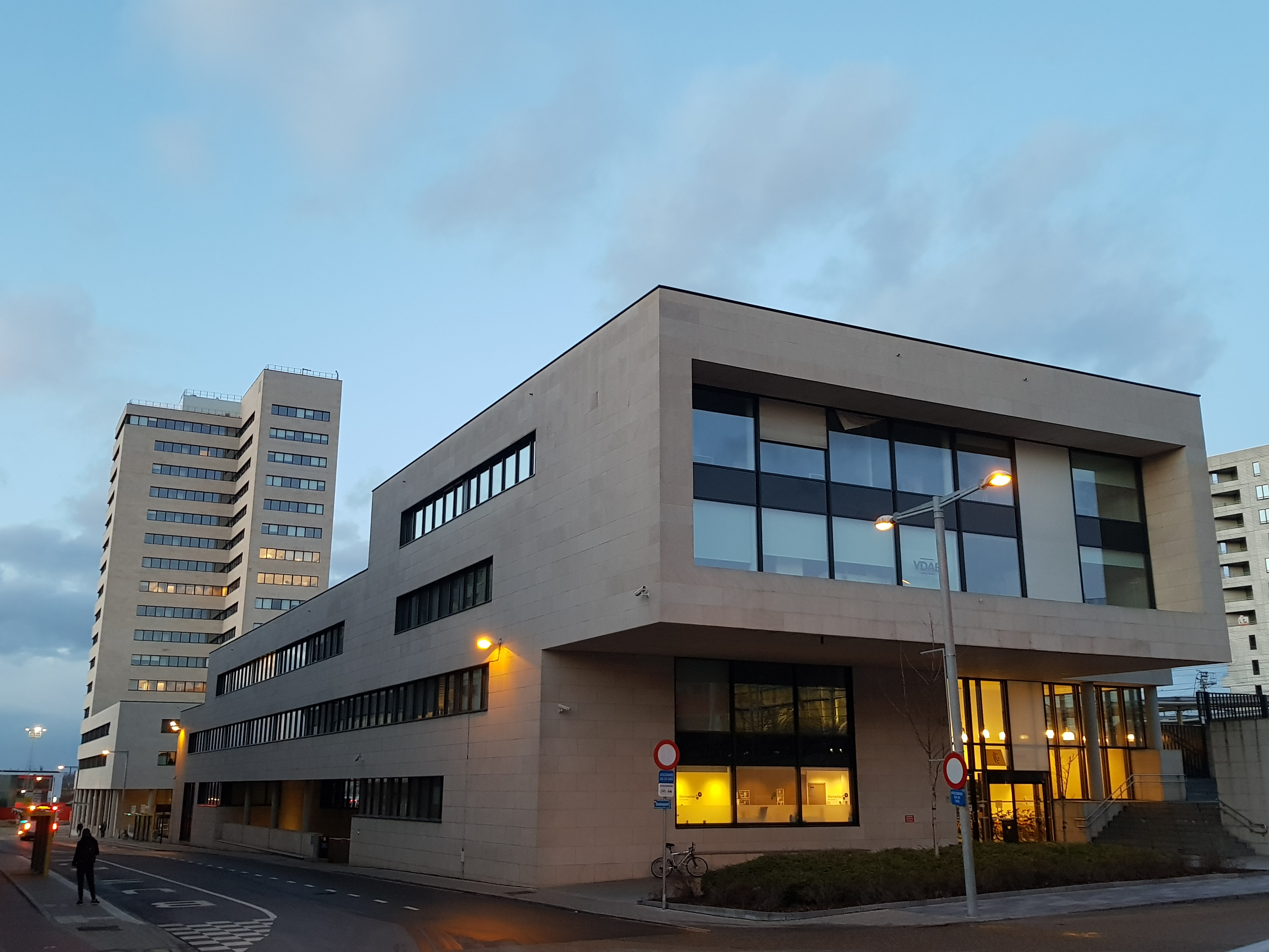 Dirk Boutsgebouw, Leuven, België